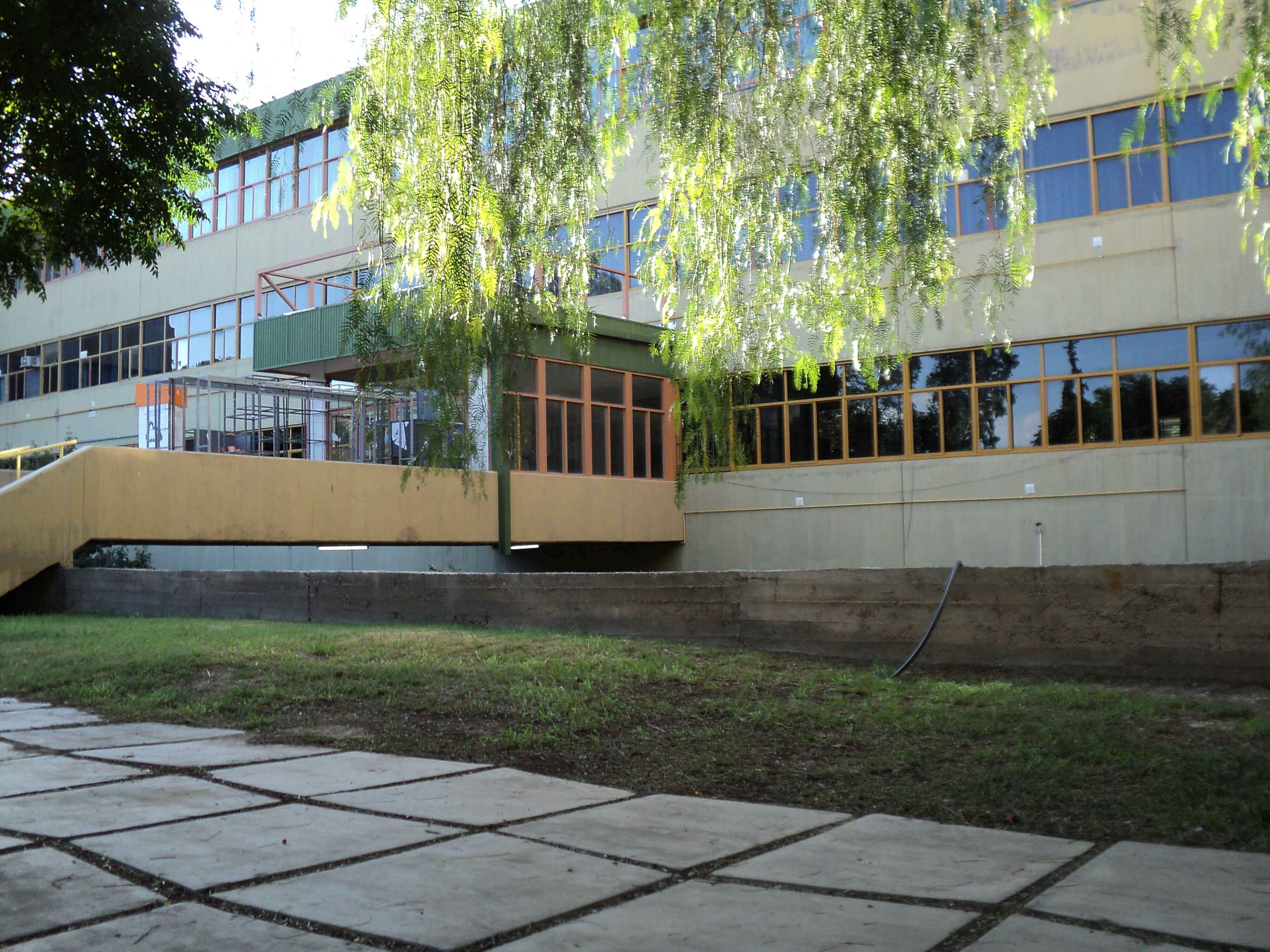 EL LADO POSTERIOR DE LA FACULTAD DE ARQUITECTURA